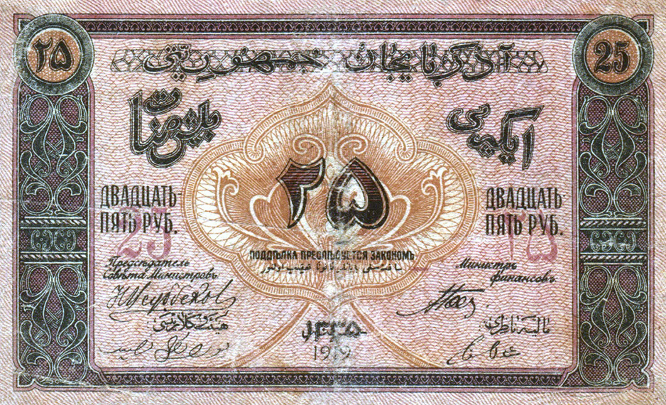 Azərbaycan Demokratik Respublikası 25 manatlıq əskinas 1919-cu il Avers